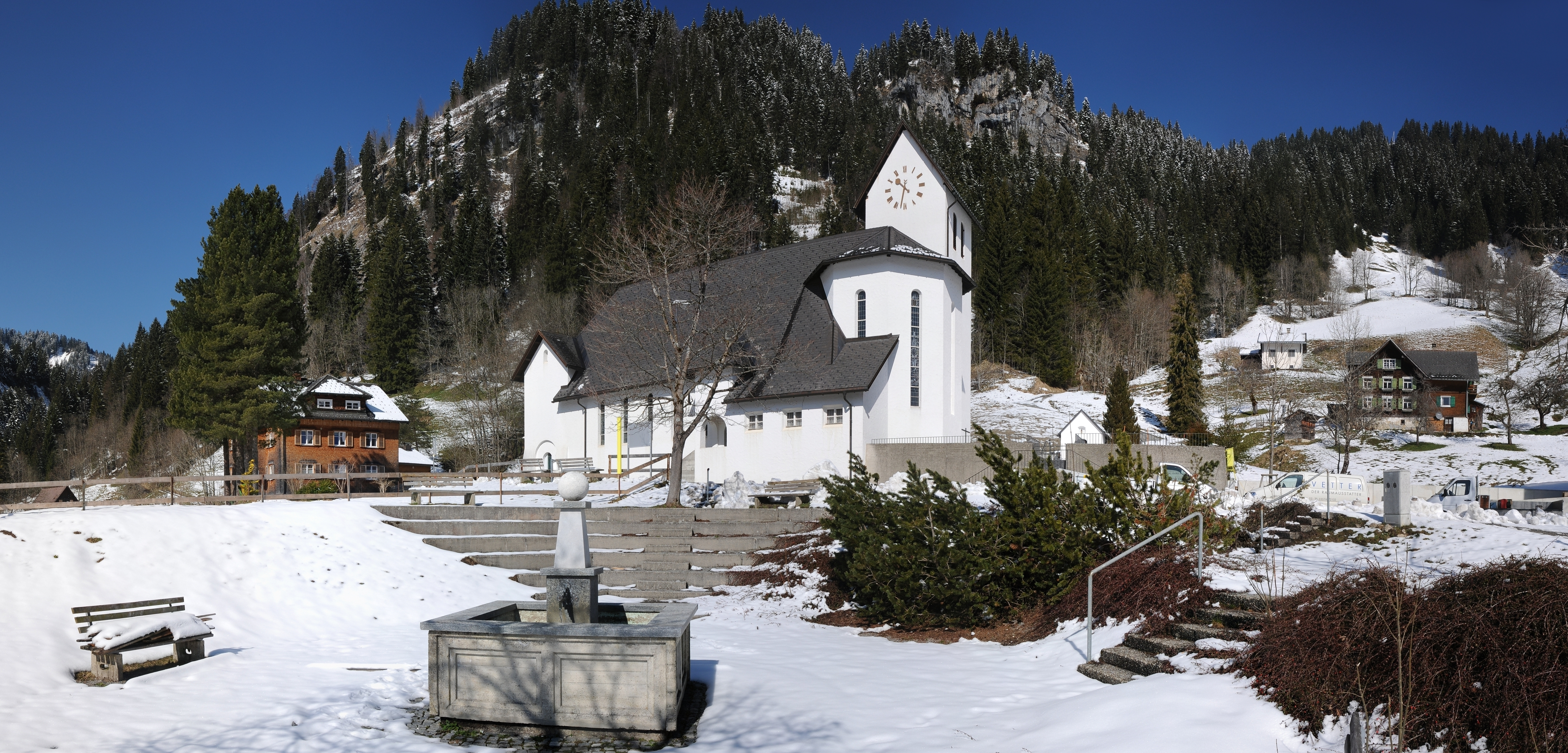 Pfarrkirche Hl. Maria Magdalena in Ebnit, Dornbirn.